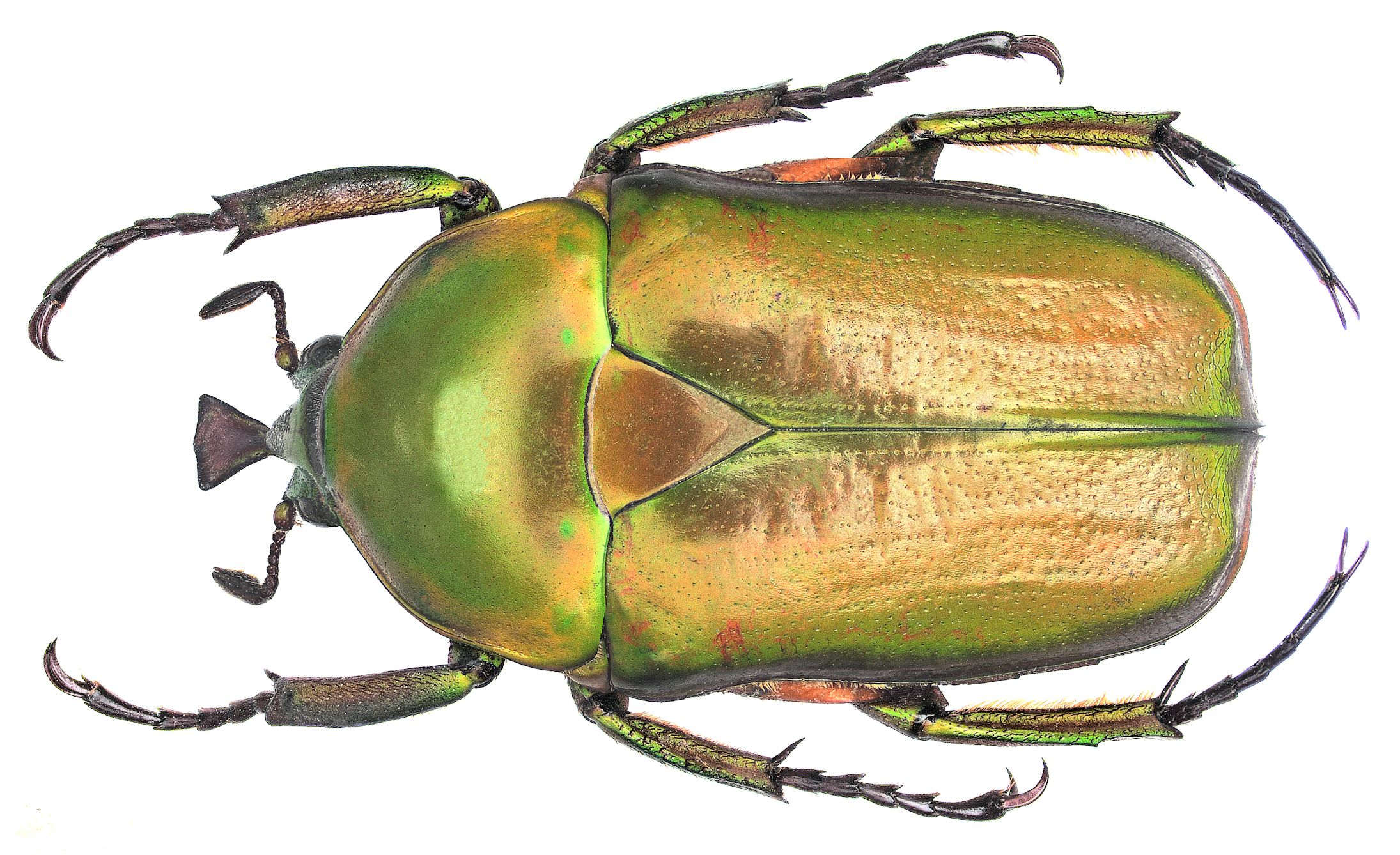 Familie: Scarabaeidae Grösse: 26 mm Fundort: Taiwan, Mt. Kantau Foto: U.Schmidt, 2006